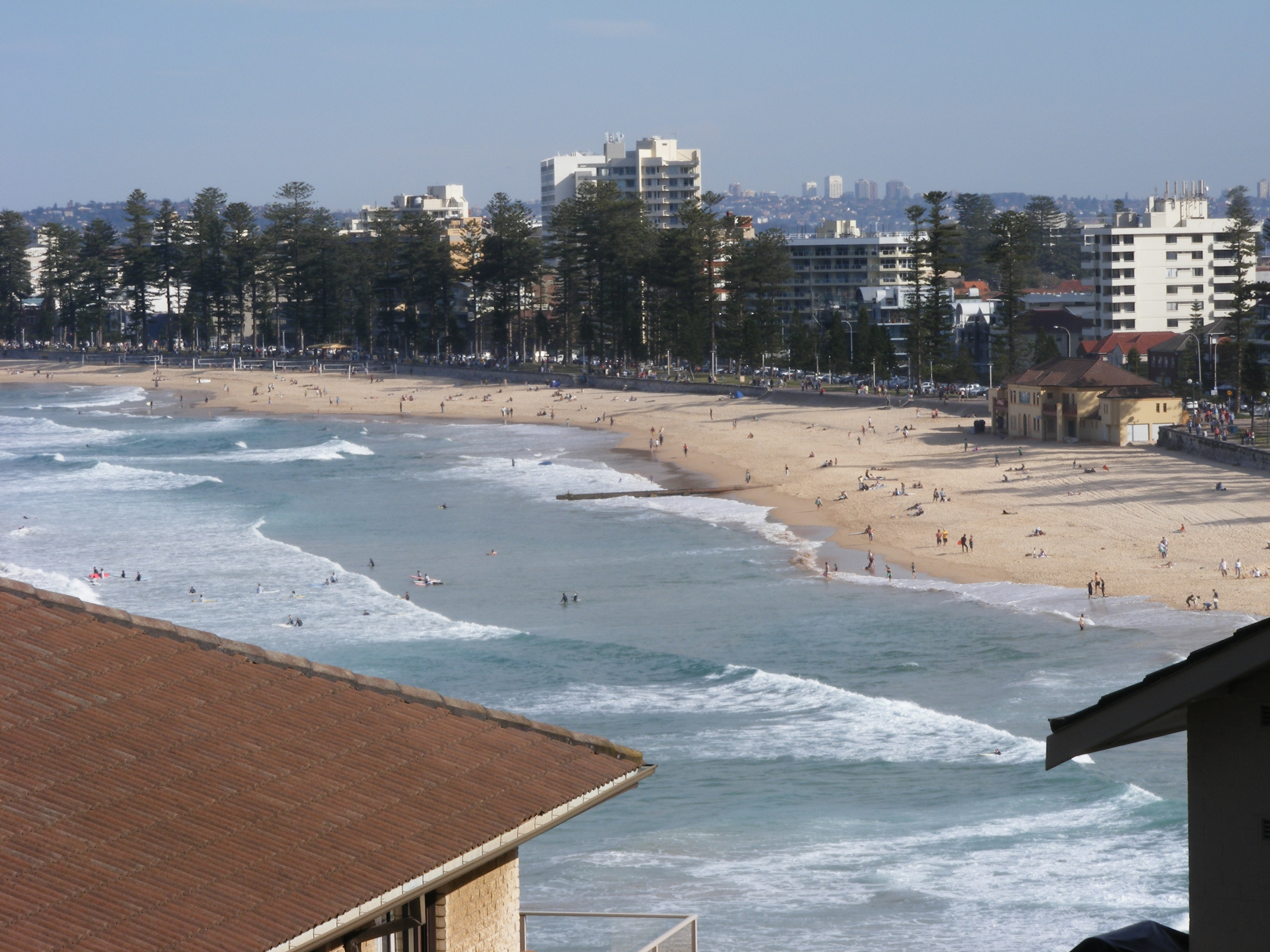 Sydney